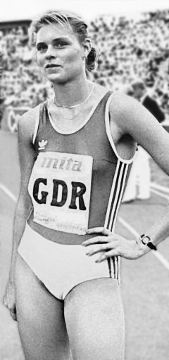 Katrin Krabbe beim Leichtathletik-Europapokalfinale (A-Gruppe) in Gateshead Die DDR-Sprintstaffel über 4x 100m siegte in der Weltjahresbestzeit von 41,87 sec.